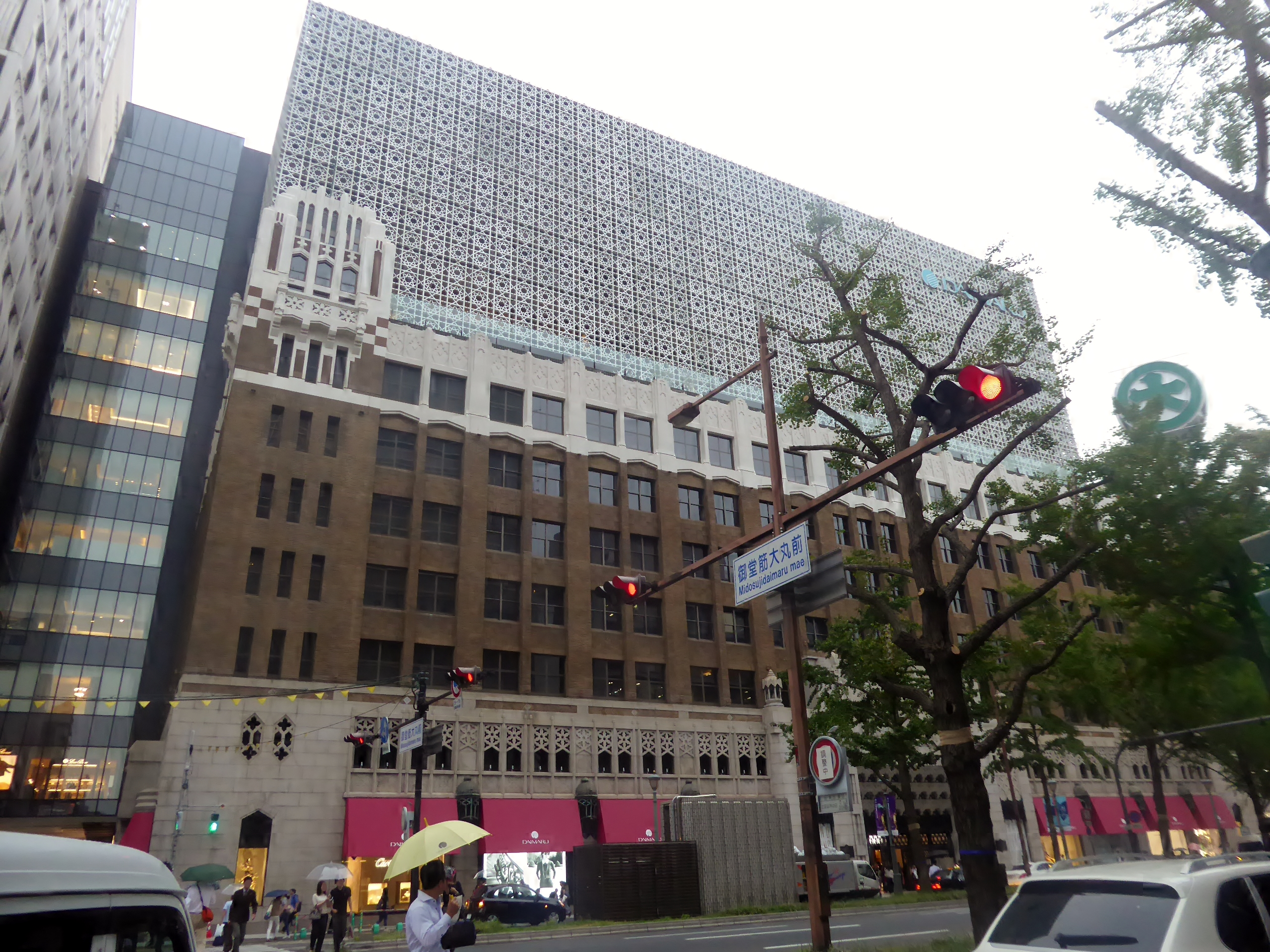 2019年9月20日時点の大丸心斎橋店本館を撮影。